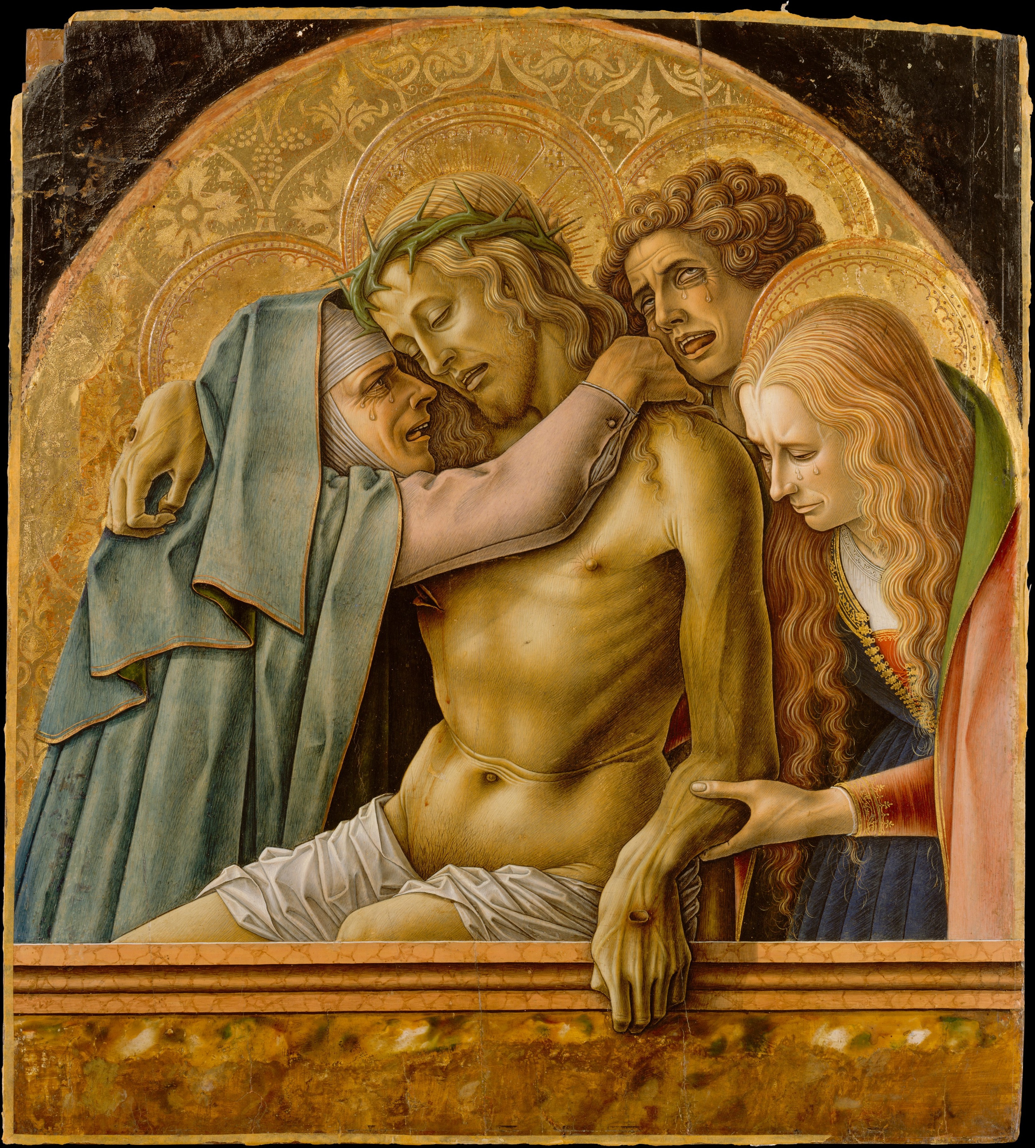 Carlo crivelli, pietà del 1476